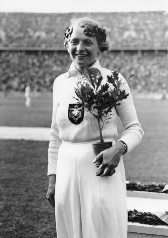 Berlin, Olympiade, Tilly Fleischer, Speerwurf-Siegerin Scherl: Berlin, Olympische Leichtathletik. Unsere erste Olympiasiegerin Frl. Tilly Fleischer (Speerwerfen) mir Siegerkranz und Eiche. 1936 Abgebildete Personen: Fleischer, Tilly: Speerwerferin, Olympiateilnehmerin 1936, Deutschland